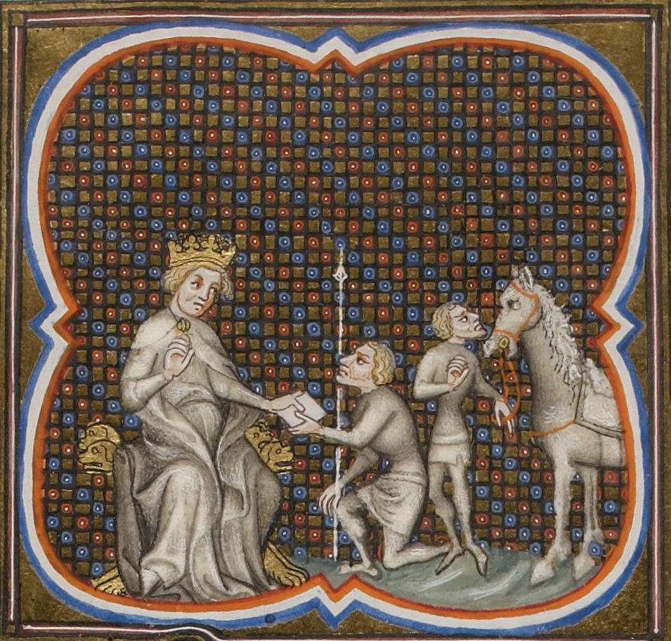 Grandes Chroniques de France, XIVe s. (BNF, FR 2813) Henri Ier, roi de Chypre, reçoit un messager